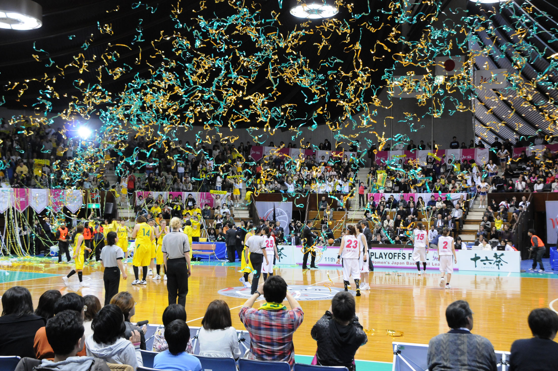 WJBL 09-10プレーオフファイナル、トヨタ対JOMO。代々木第二体育館で。